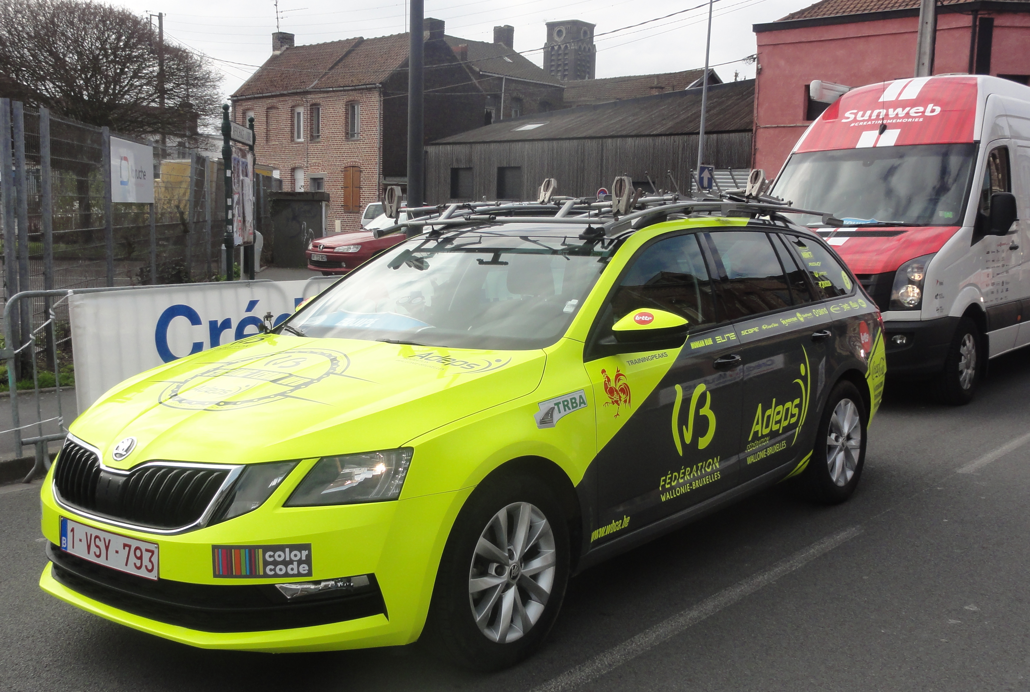 Reportage réalisé le dimanche 24 mars à l'occasion du départ et de l'arrivée du Grand Prix de Denain 2019 à Denain, Nord, Nord-Pas-de-Calais-Picardie, France.